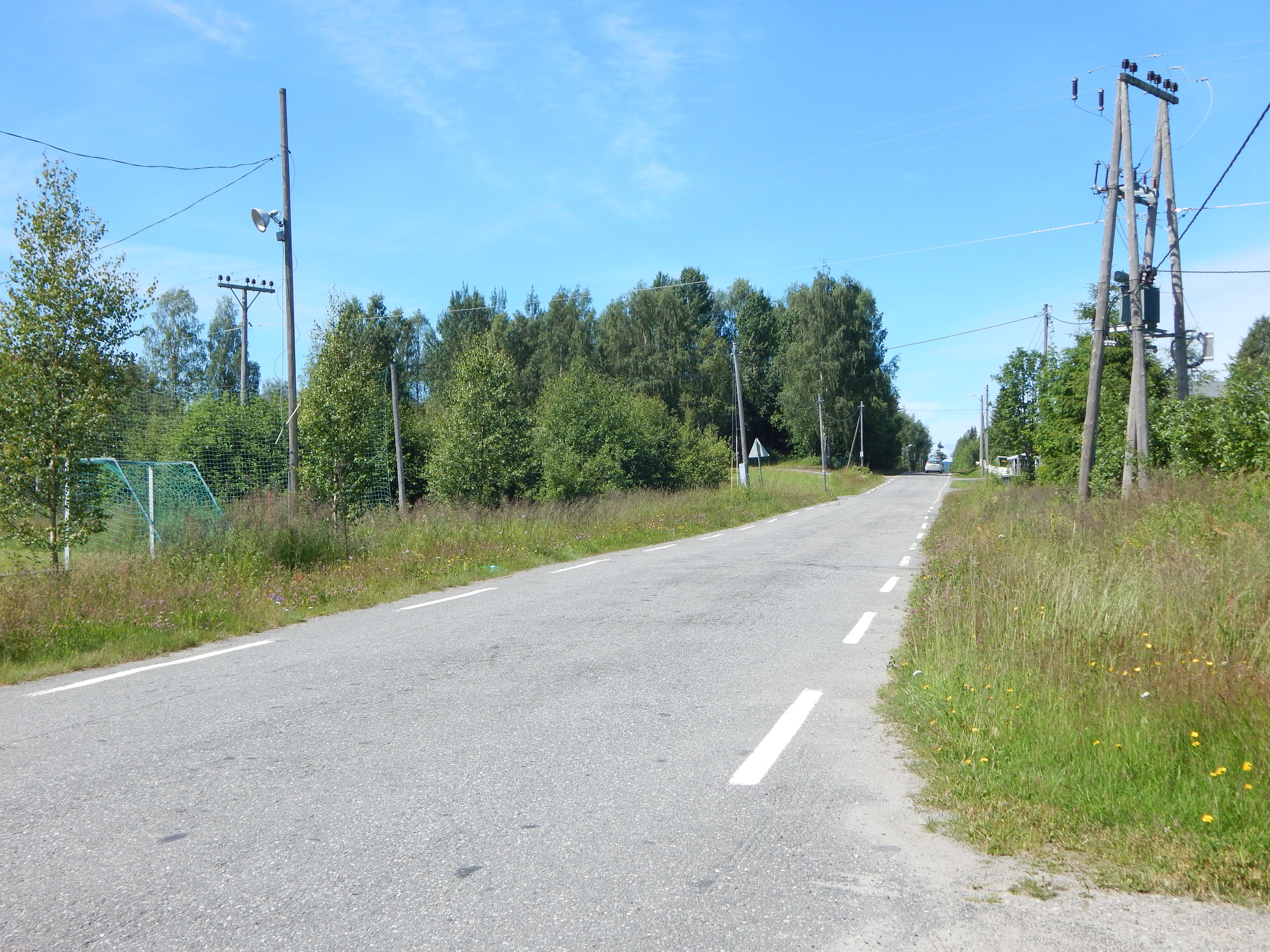 Skogen (FV541)